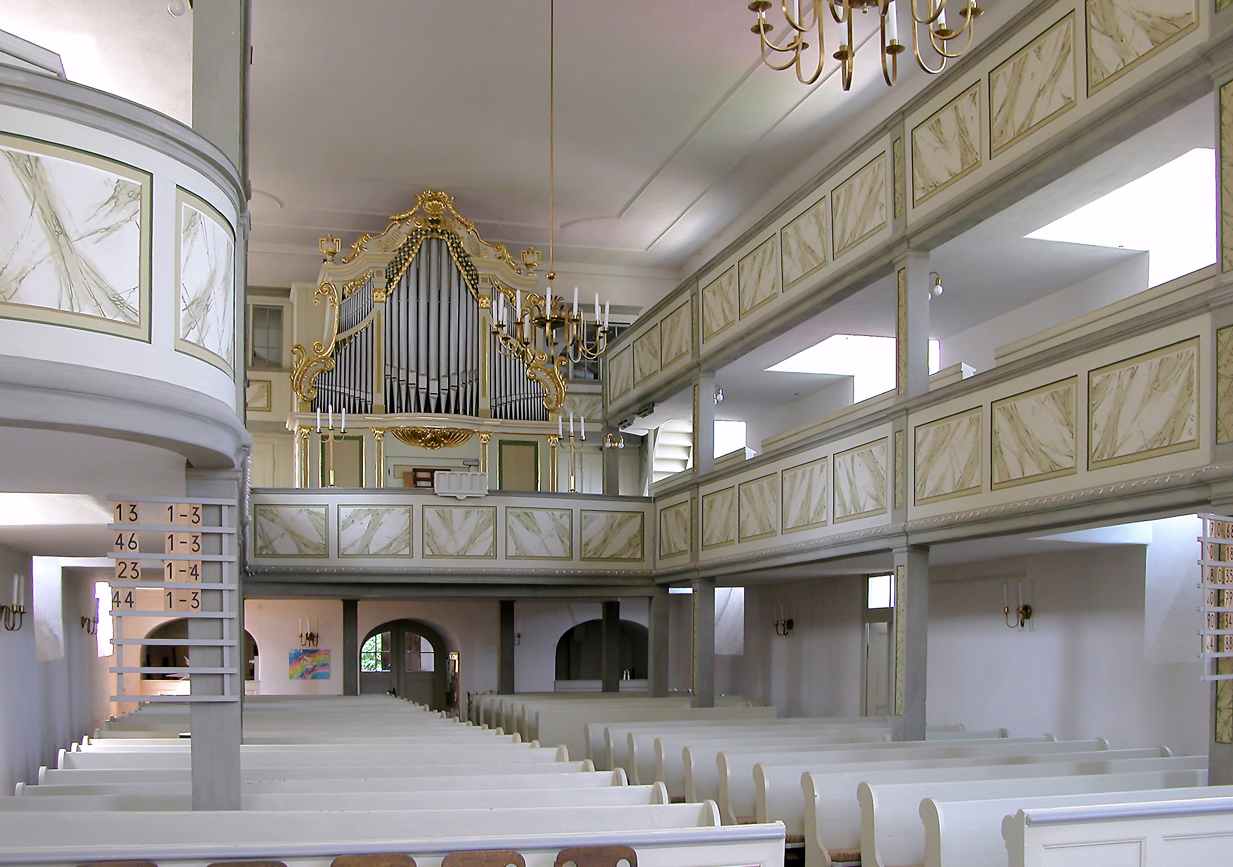 12.06.2003 01665 Zehren (Diera-Zehren): St. Michaelis, Bergstraße 11 (GMP: 51.199924,13.404187). Schon 1316 wird erstmals eine Kapelle erwähnt, die dem Heiligen Michael geweiht ist. Sie wurde 1545 abgerissen. Die heutige St. Michaeliskirche wurde 1756-1775 erbaut. Der Orgelprospekt stammt von 1763 und ist bei Vergrößerungen der Orgel 1806 und 1913 erweitert worden. Die Orgel besitzt heute ein pneumatisches Werk von der Firma Hermann Eule, Bautzen. [DSCN]20030612140DR.JPG(c)Blobelt